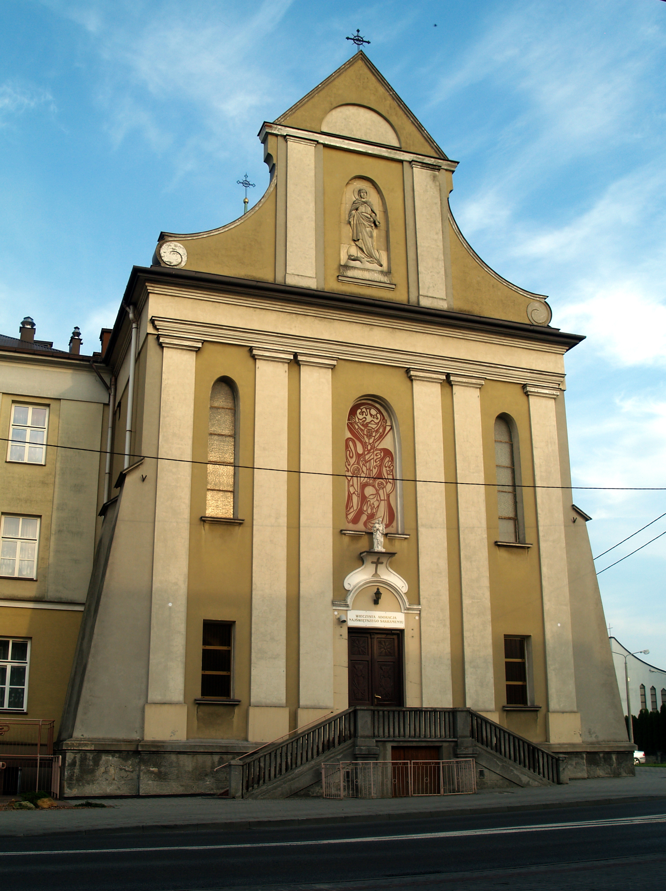 Kościół Matki Bożej Anielskiej w Dębicy